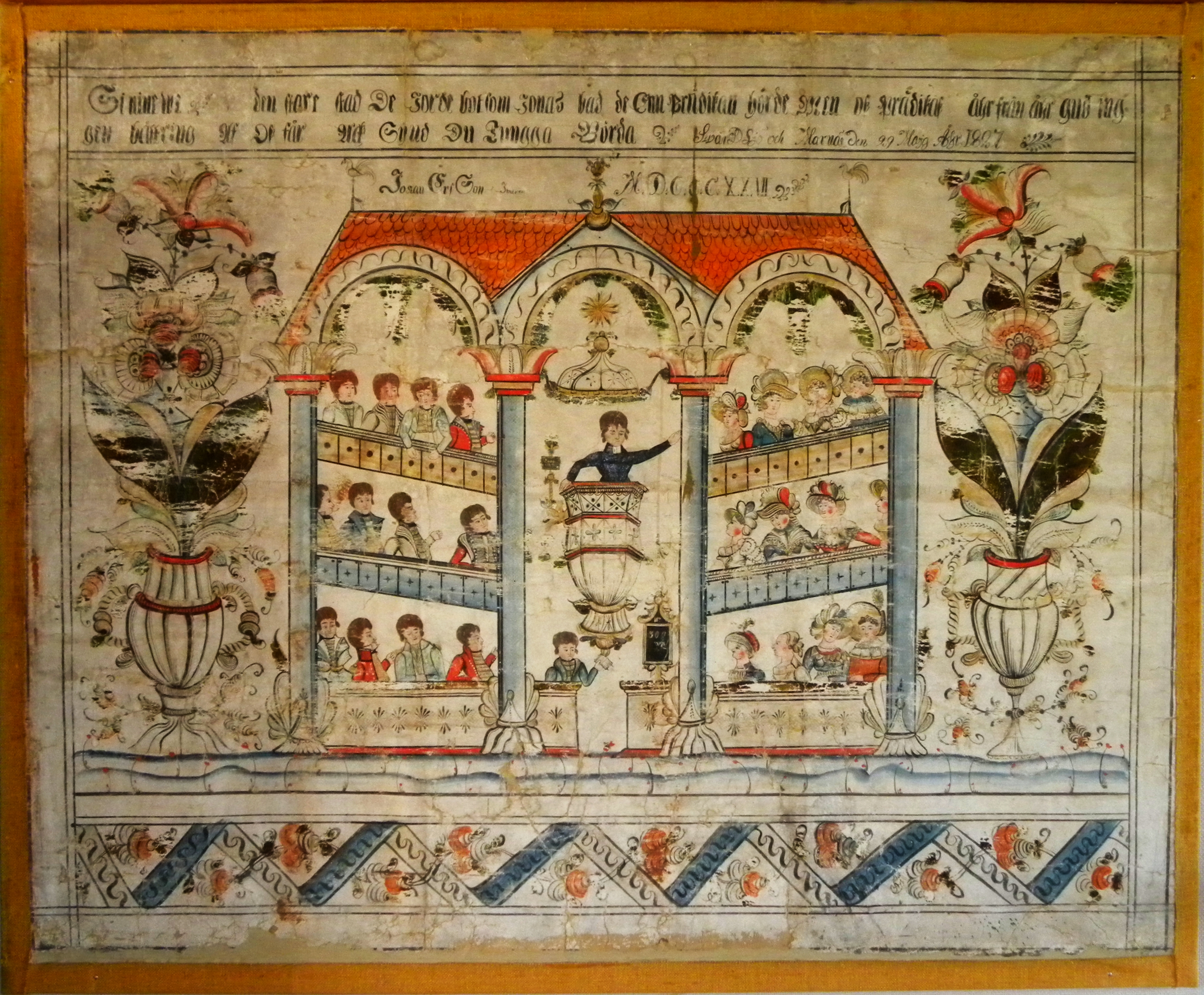 Dalmålning från 1827 av Johan Ersson, Marnäs, Svärdsjö. Text: Si Ninewi den store stad De Jorde bot som Jonas bad de Enn prädikan hörde men oss prädikas åhr från åhr Gud ing-gen bättring Af Oss får Ack Synd Du Tungga Börda